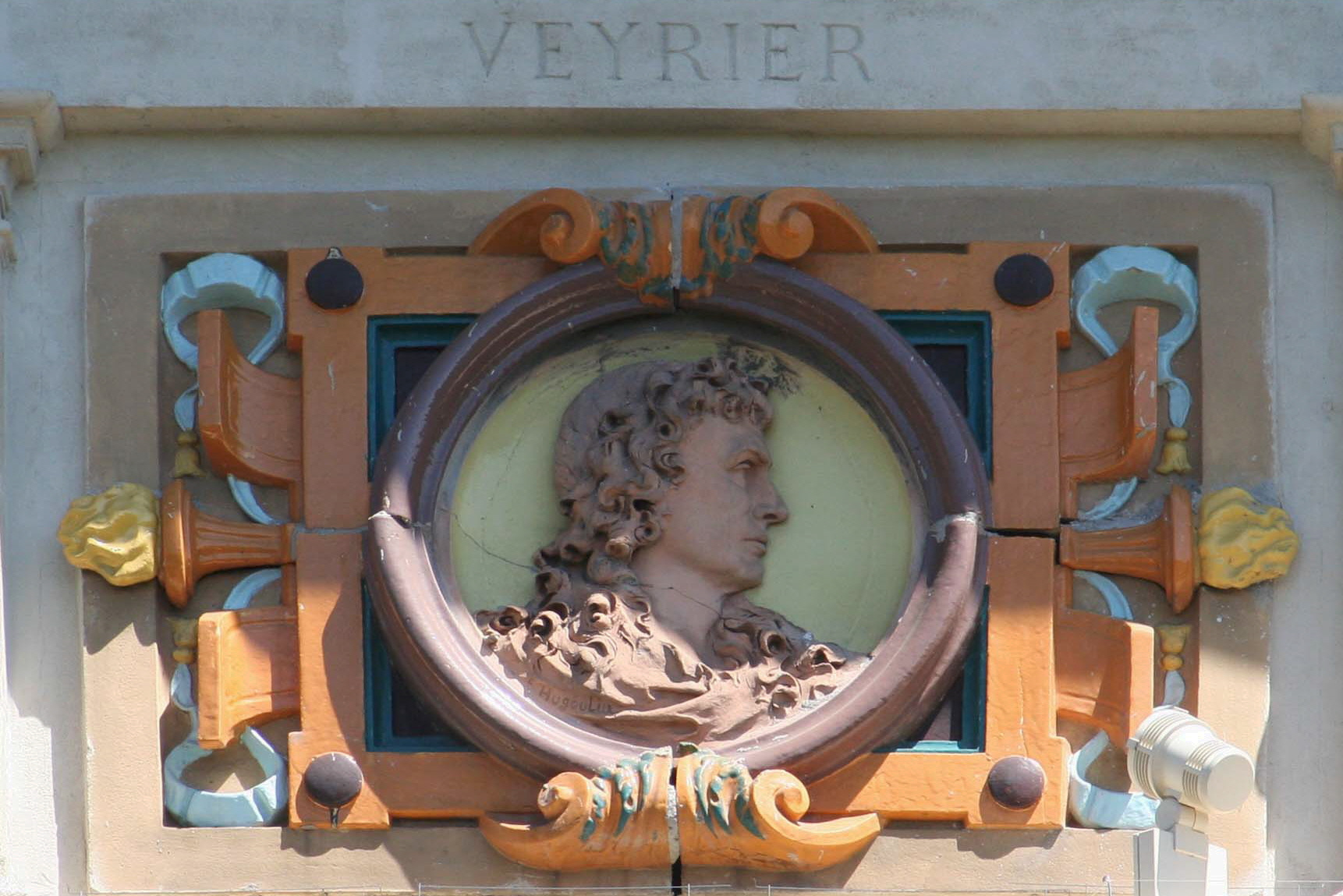 Médaillon de Christophe Veyrier sculpté par Emile Hugoulin se trouvant sur la façade du palais d'art de Toulon.